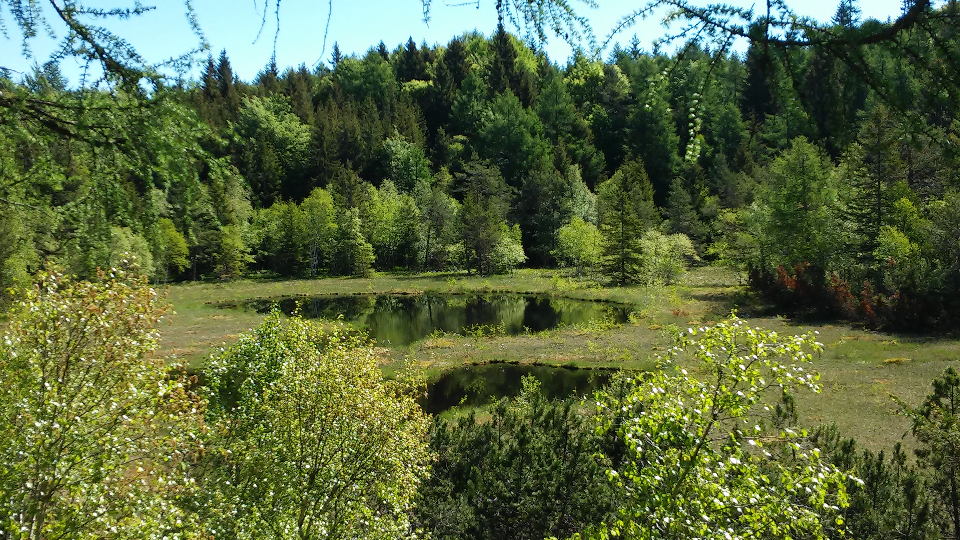 Laghetto di Vedes: l'area protetta comprende la torbiera, in cui c'è un piccolo lago, e parte dei boschi circostanti (Q49967095)